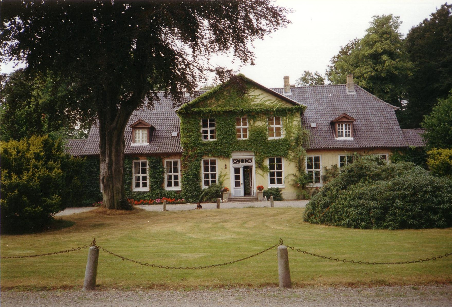 Herrenhaus auf Gut Falkenberg, Gemeinde Lürschau, Kreis Schleswig (Germany)